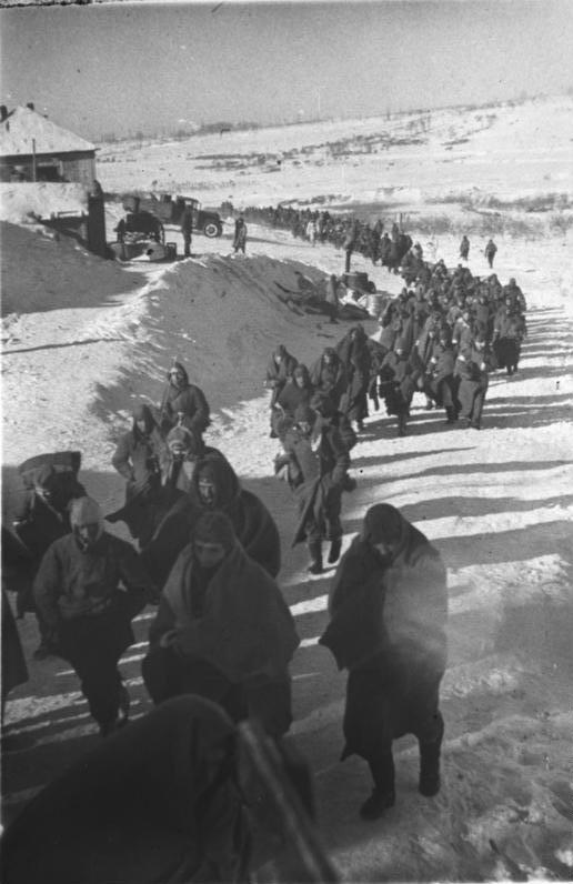 Kolonne deutscher Kriegsgefangener ADN-ZB/Archiv II.Weltkrieg 1939-45 Die Stalingrader Schlacht begann im Juli 1942. In erbitterten, beiderseits verlustreichen Kämpfen wehrte die Rote Armee das weitere Vordringen der faschistischen Truppen ab. Während der sowjetischen Gegenoffensive im November 1942 wurden über 300.000 Mann eingeschlossen. Die Reste dieser Verbände etwa 91.000 Mann, kapitulierten am 31.1. und 2.2.1943. Eine Kolonne deutscher Kriegsgefangener aus Stalingrad auf dem Marsch ins Gefangenenlager, Februar 1943.